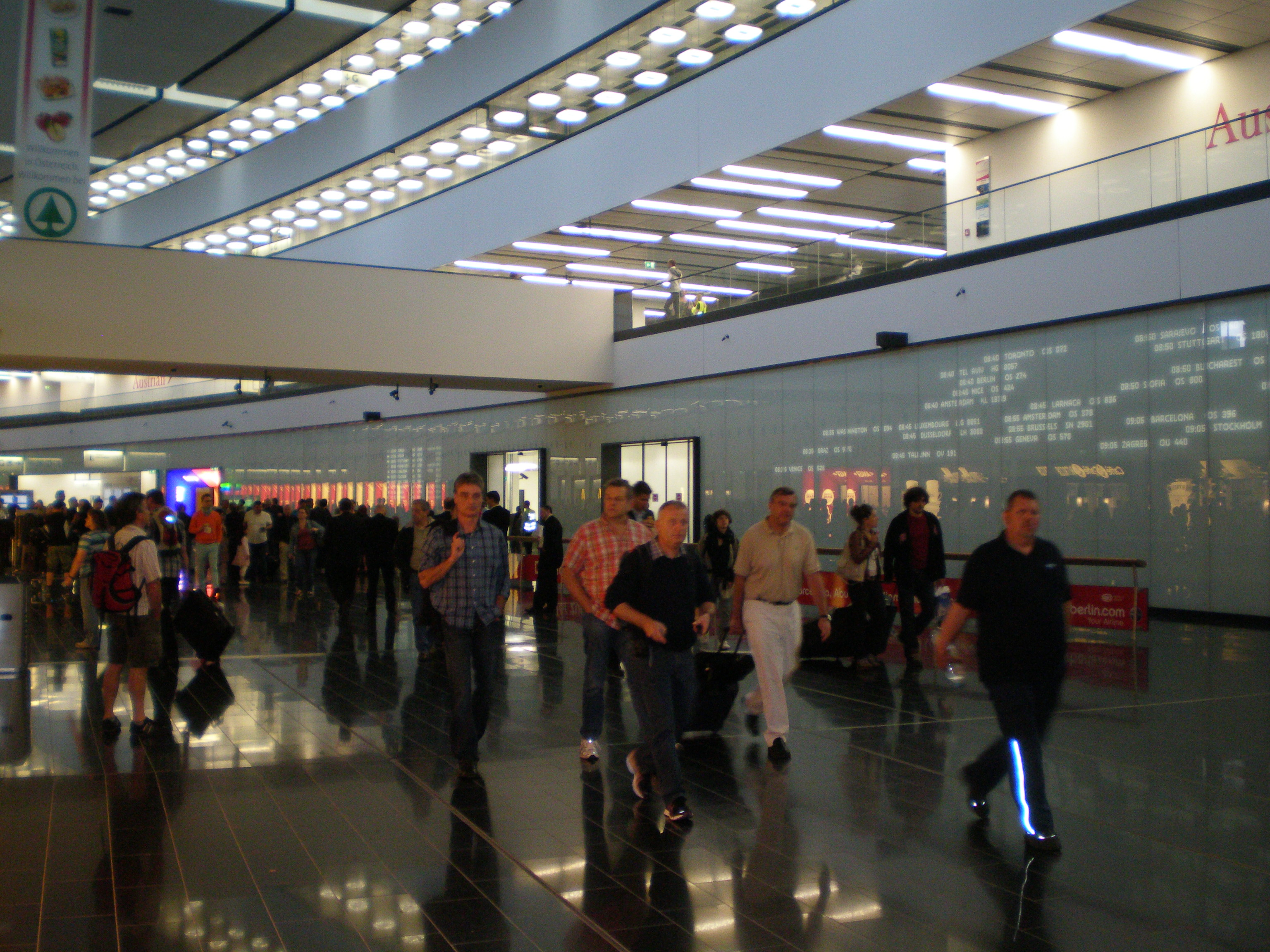 Die Ankunftshalle am Flughafen Wien befindet sich auf Ebene 0.